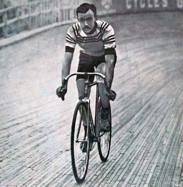 Lucien Petit-Breton, recordman de l'heure le 24 août 1905 à Paris.